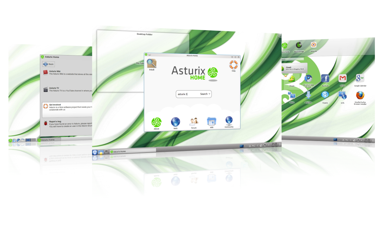 Asturix 3